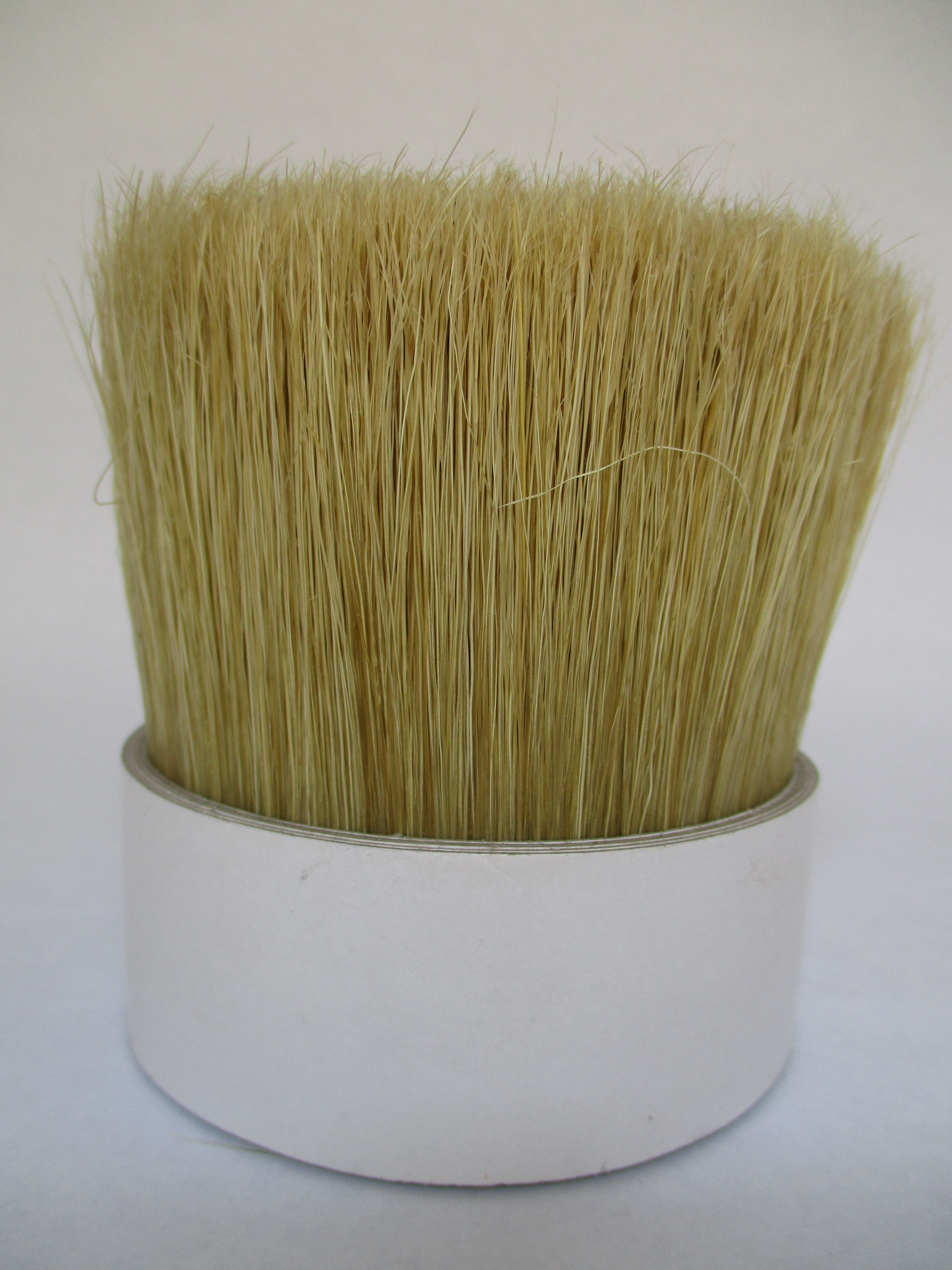 Botte de soies de porc blanches provenant de Chine